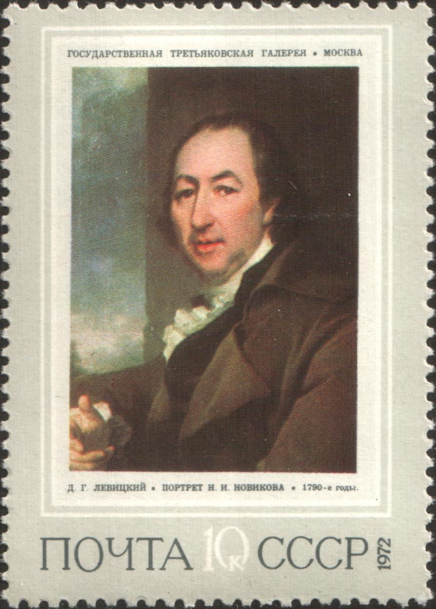 Портрет (1790-е гг.) просветителя, писателя-сатирика Н. И. Новикова (1744-1818)